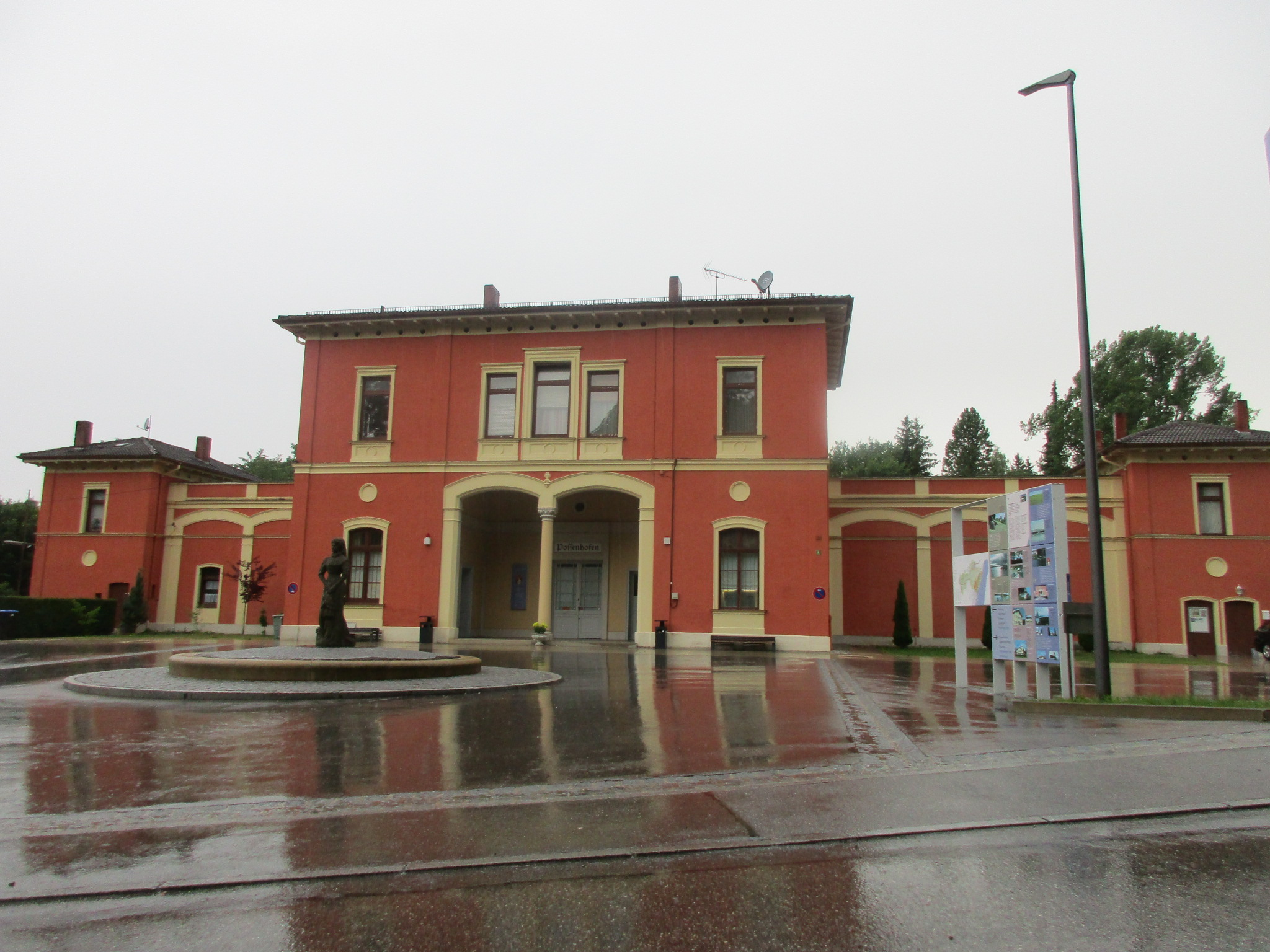 Gare et musée de l’Impératrice Elisabeth d'Autriche (Sissi) de Possenhofen